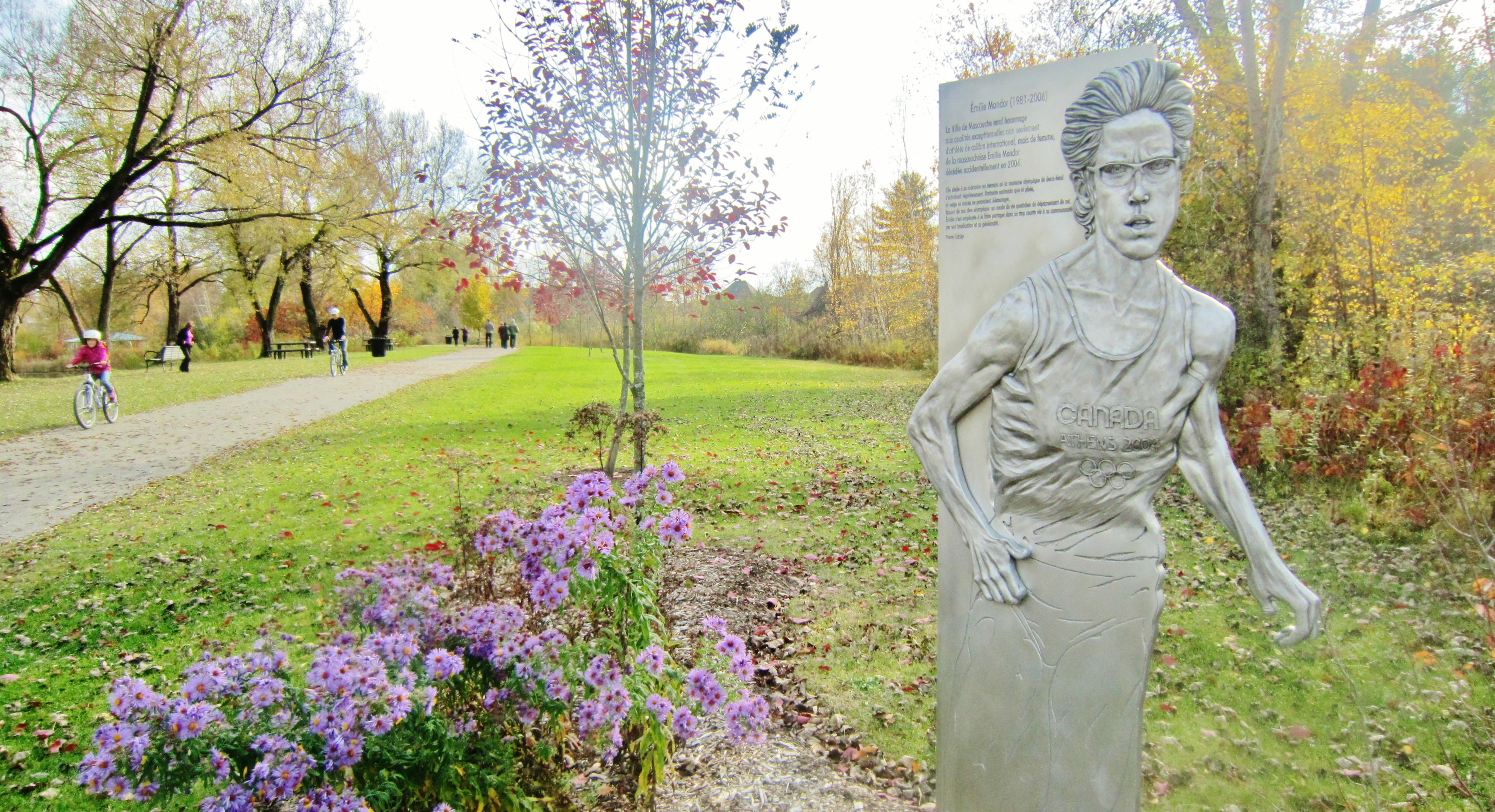 Héroïne morte trop jeune veille sur les promeneurs du parc. / An Angel watch over the joggers in the park